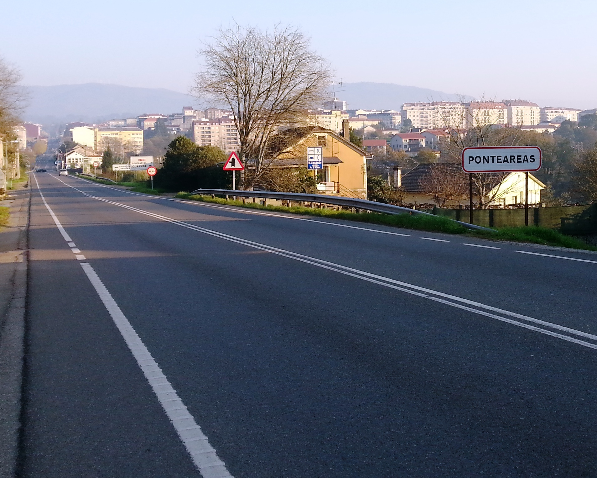 Véxase o título e as categorías